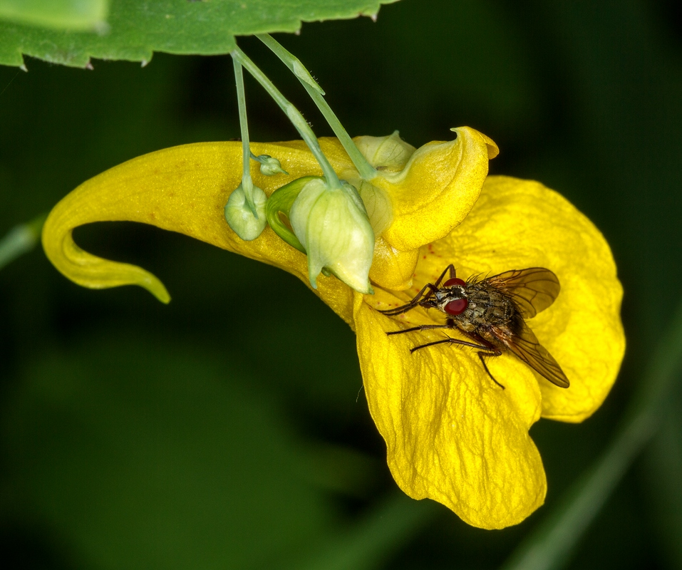 Sachsen - im Feuchtbiotop: Großes Springkraut